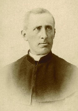 Zygmunt Gorazdowski (1845-1920) – święty katolicki, polski ksiądz.